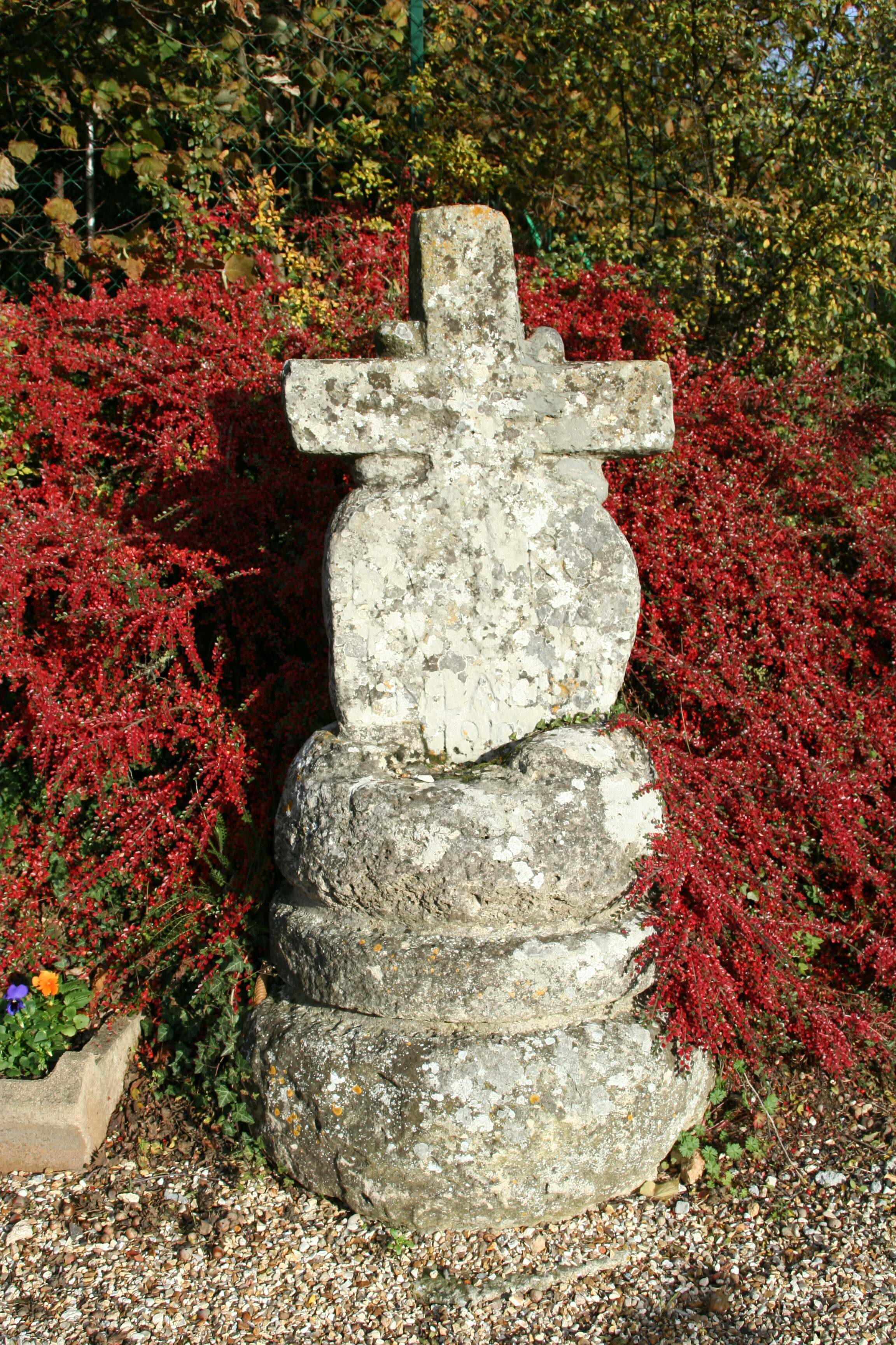 Croix Saint-Aubin à Épône, Yvelines (France)